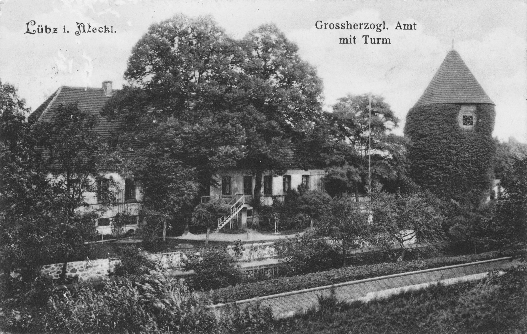 Grossherzogliches Amt Lübz in Mecklenburg, 1914